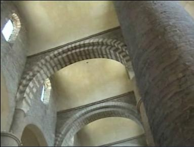 Quertonnengewölbe in St.Philibert in Tournus/Burgund Sonstiges: ...